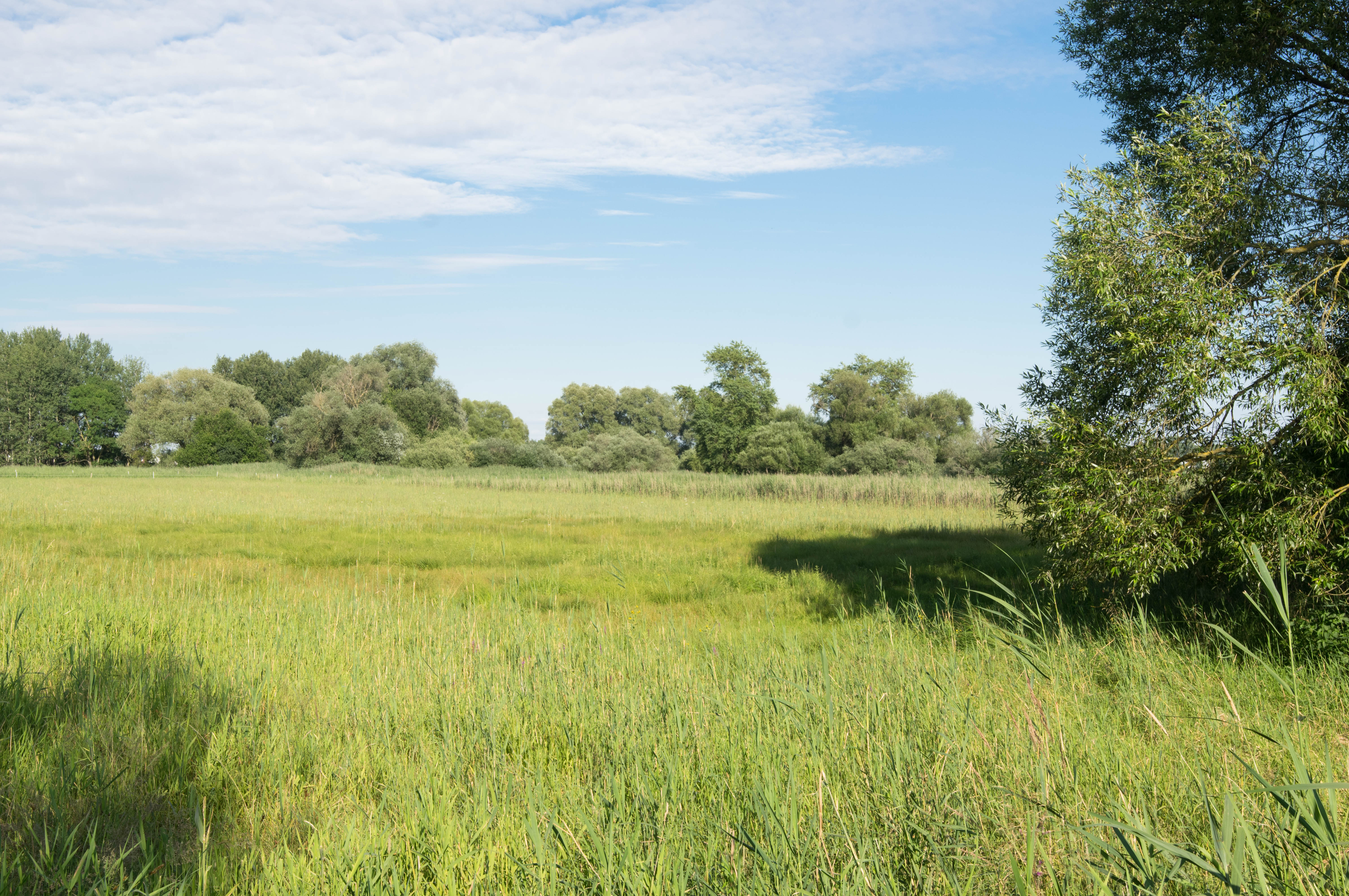 Teilansicht von Westen in die Nasswiesenbereiche hinein, Landschaftsschutzgebiet, LSG-00324.01